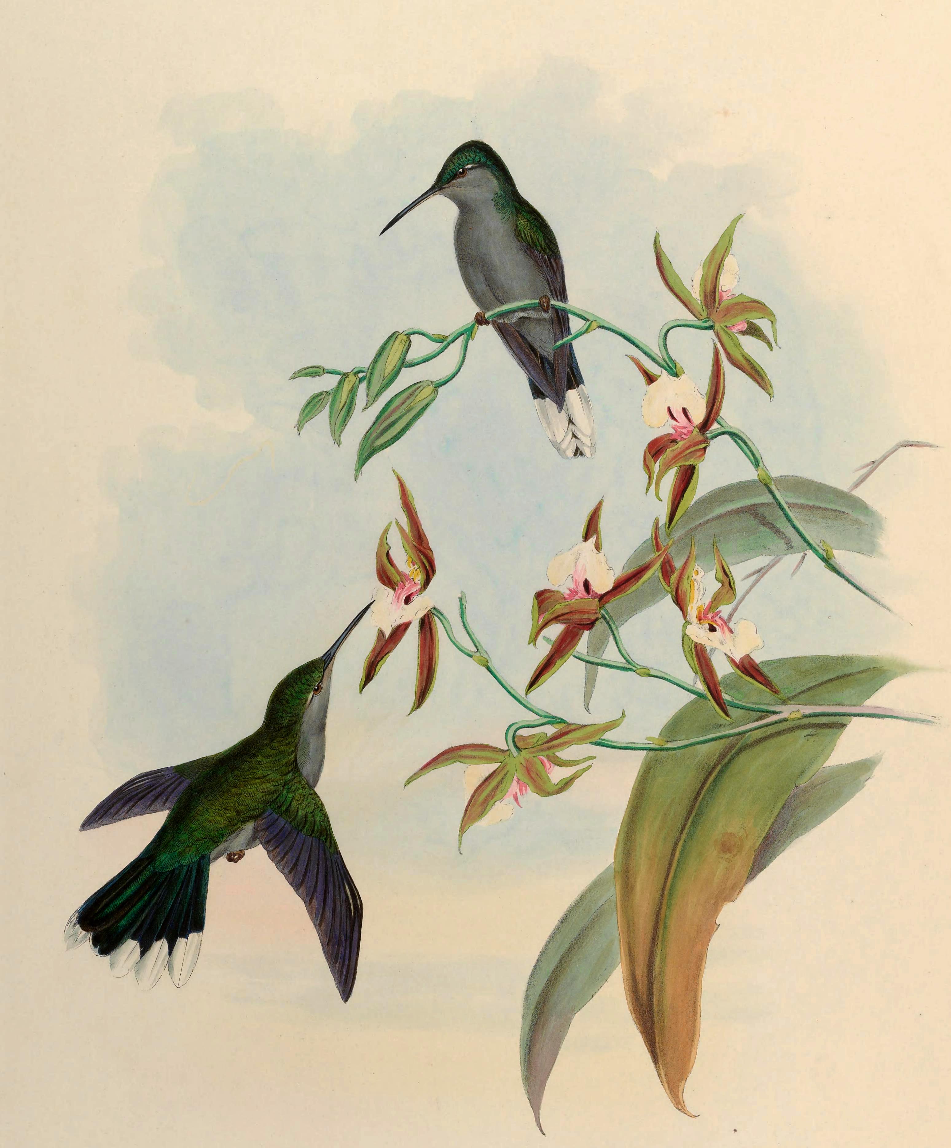 Campylopterus latipennis = Campylopterus largipennis [1]